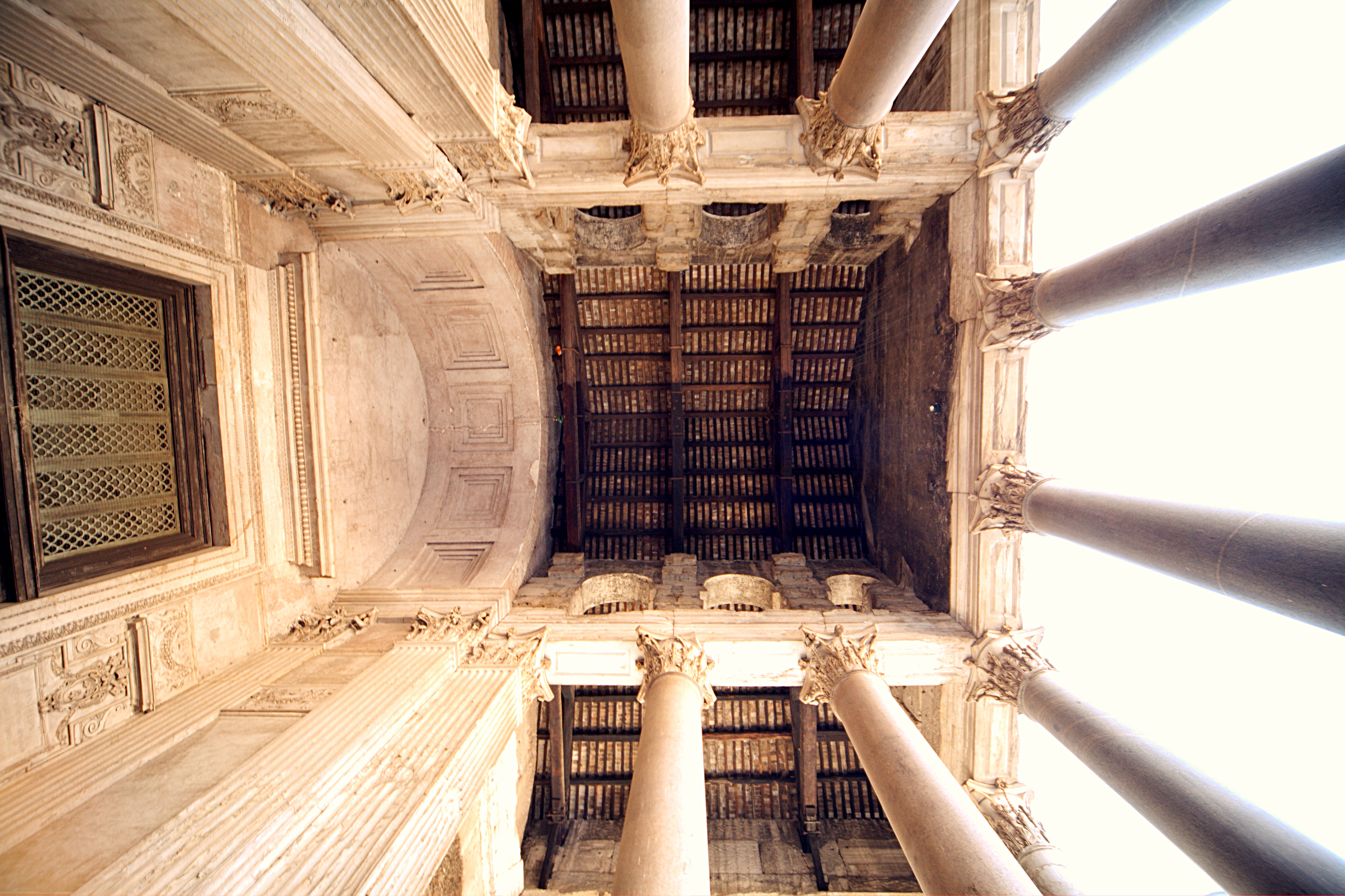 Eingangshalle des Pantheon in Rom